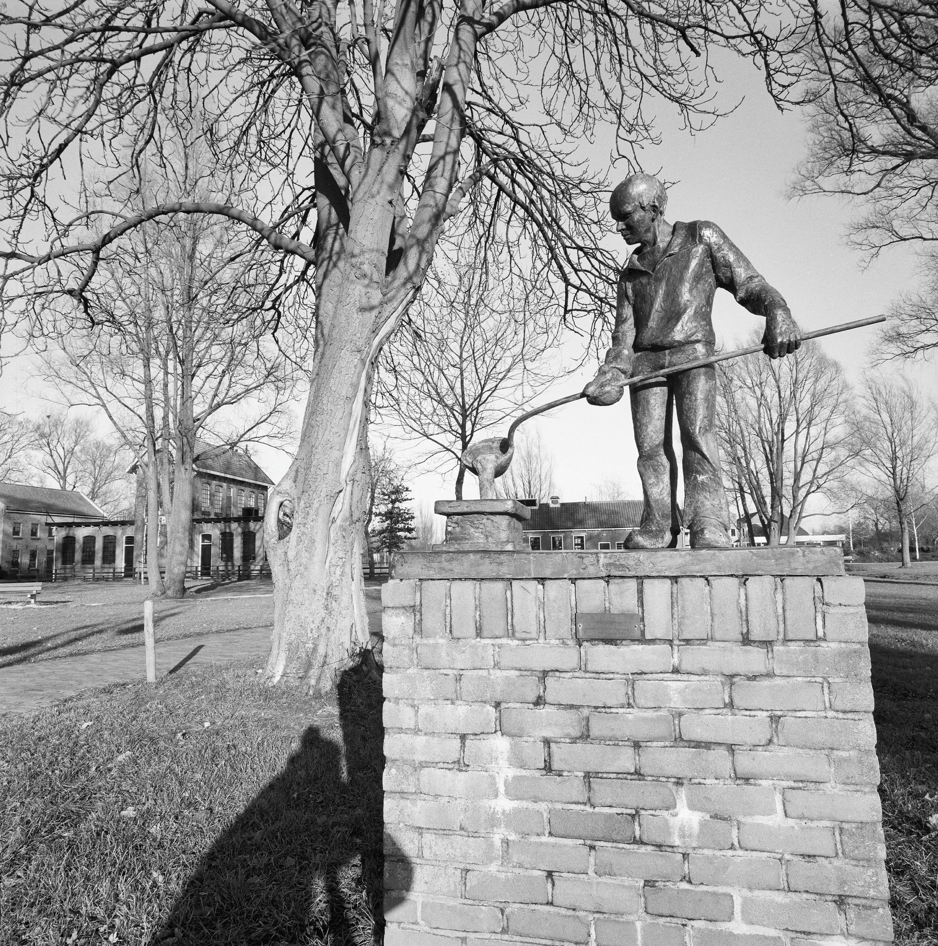 MUSEUM JOURE: Exterieur BEELD 'DE GEELGIETER' (ANNET HARING, 1993) OVERZICHT (opmerking: BOEK: "BEELD OP HET WERK")